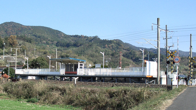 肥薩おれんじ鉄道線たのうら御立岬公園駅 ホーム ホームには安全柵が設置されている。 写真左奥が八代駅方面。 撮影者/著者/著作権保有者 : MK Products (本人がアップロード) 撮影日 : 2006/12/19 たのうら御立岬公園駅用にアップロードした画像です。良い画像があれば別の画像に変えてください。